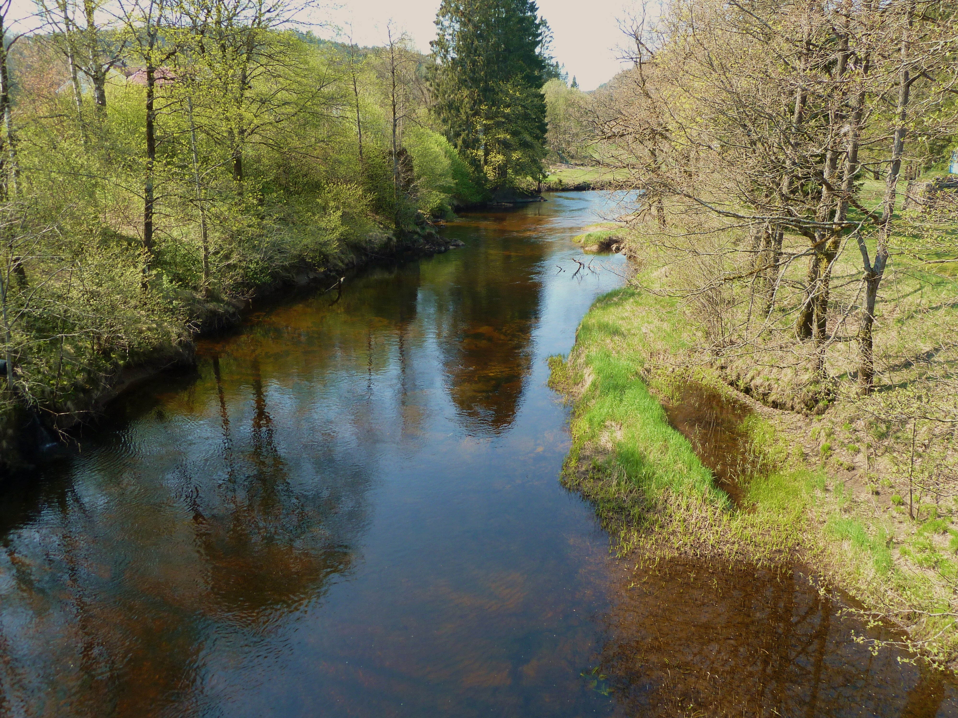 Songdalselva på Nodeland.